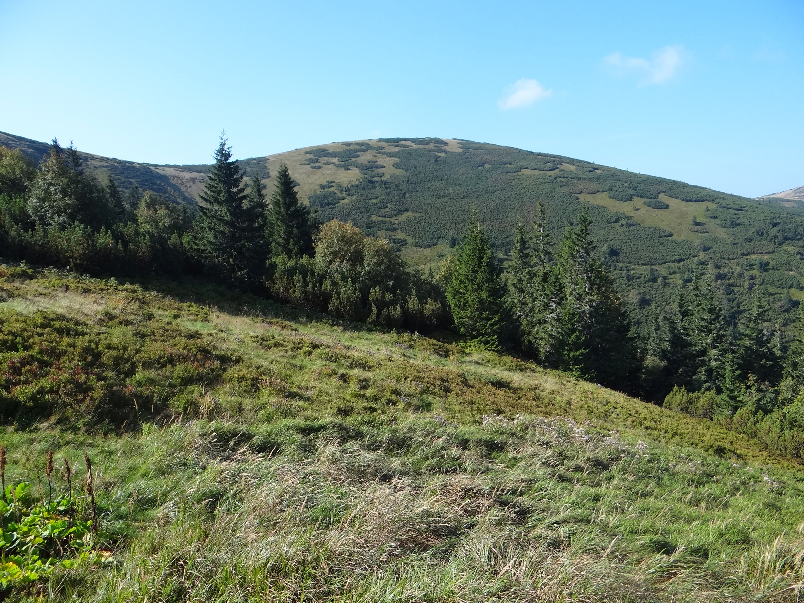 Zámostská hoľa. Widok od północnej strony (z żółtego szlaku z osady Magurka)